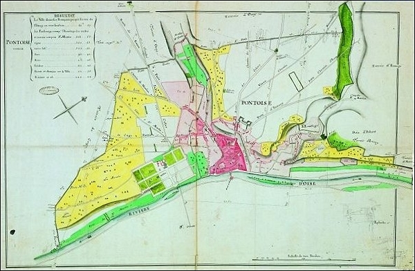 Pontoise (France) Plan d'intendance (1778) Ce plan figure le terroir de Pontoise à la fin du XVIIIe siècle : la culture dominante est la vigne (figurée en jaune). Les prés (en vert) occupent la plaine alluviale de l'Oise. Le bâti (en rose) a colonisé l'éperon rocheux et les rebords des plateaux des Cordeliers et de Saint-Martin.